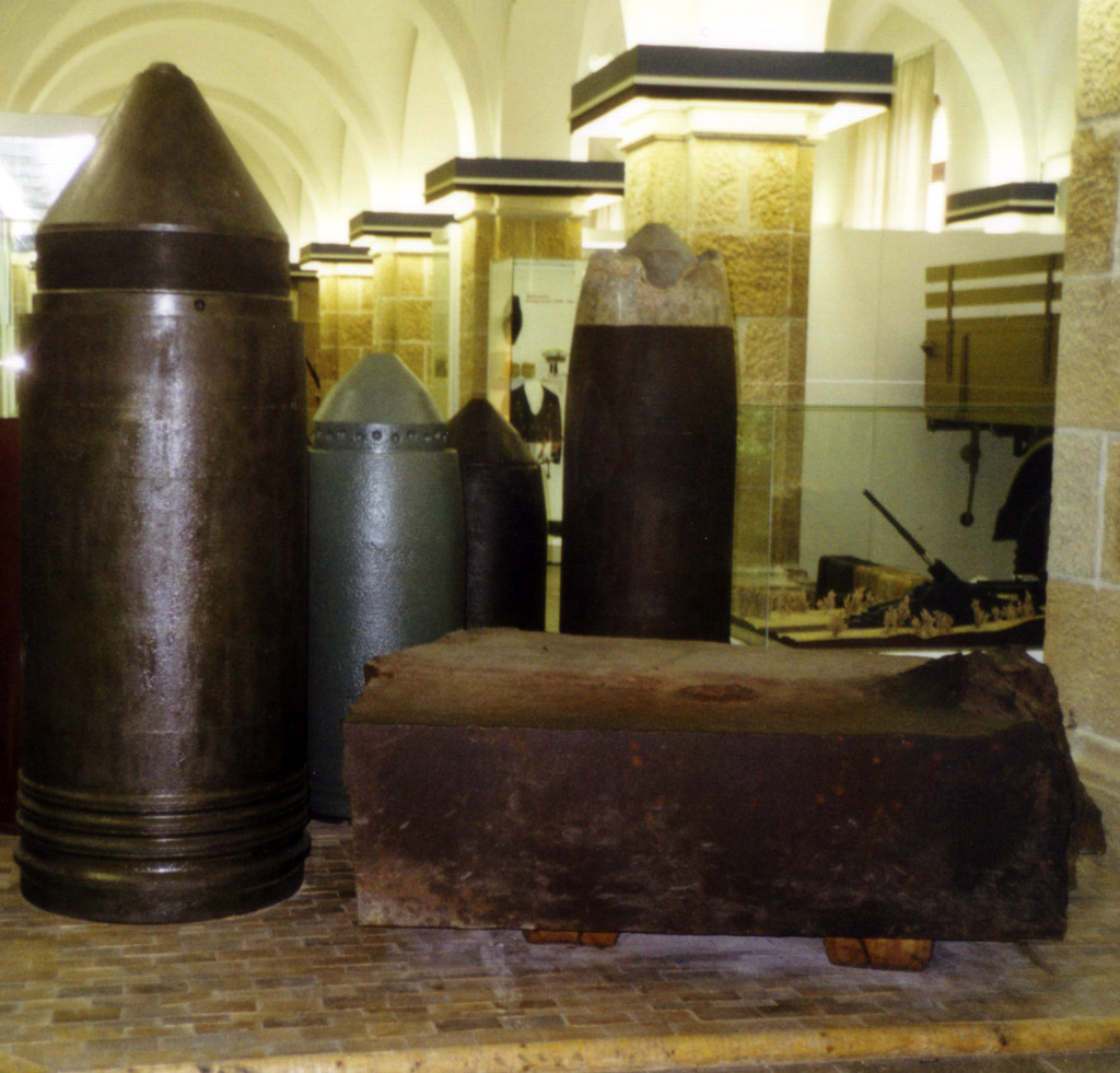 diverse Granaten - ein Geschoss des Dora-Geschützes steht links im Bild